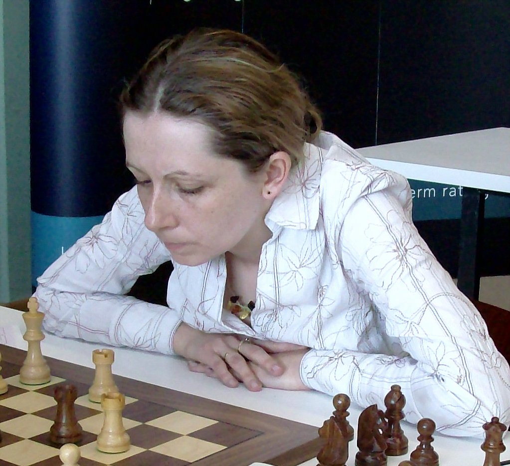 Monika Socko, chess grandmaster from Poland